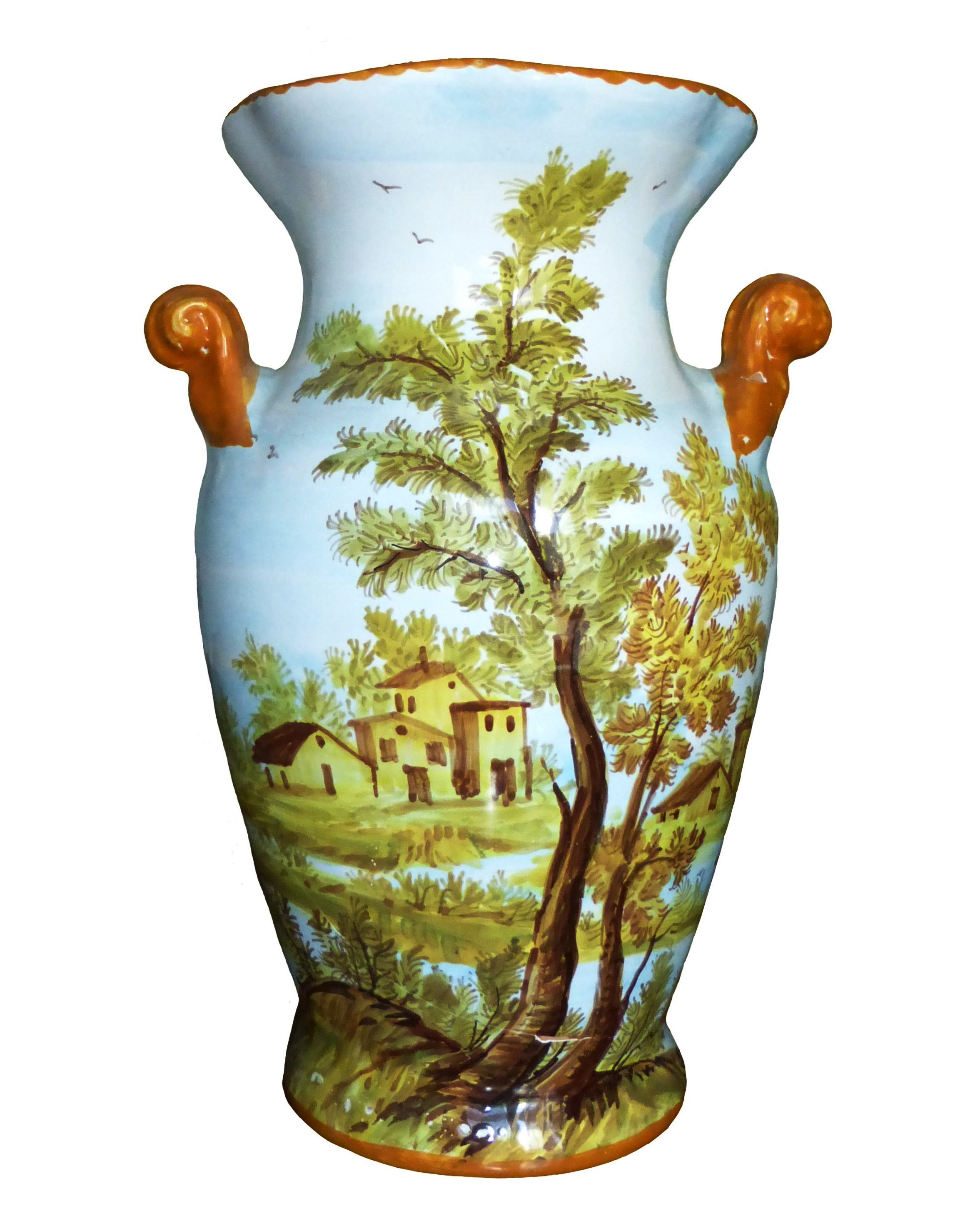 Vaso di ceramica della scuola di Rapino, Chieti. Artista: Gabriele Vitacolonna